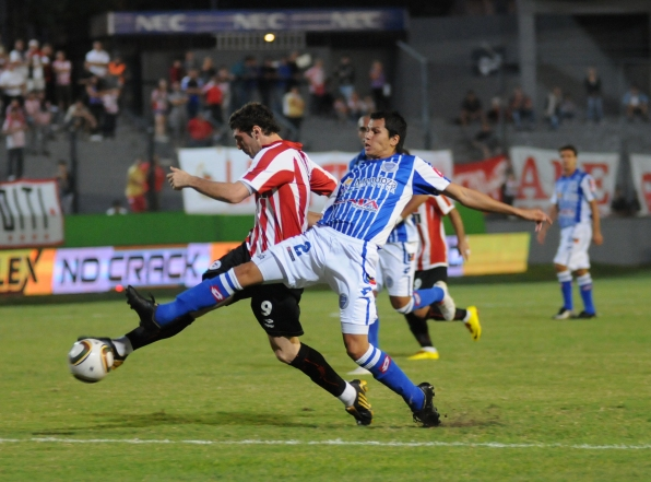 Mauro Boselli, de Estudiantes de La Plata, disputa la pelota ante la marca de Leonardo Sigali, de Godoy Cruz de Mendoza, durante el partido que ambos equipos jugaron por la 12.ª fecha del Torneo Clausura 2010 de Argentina.